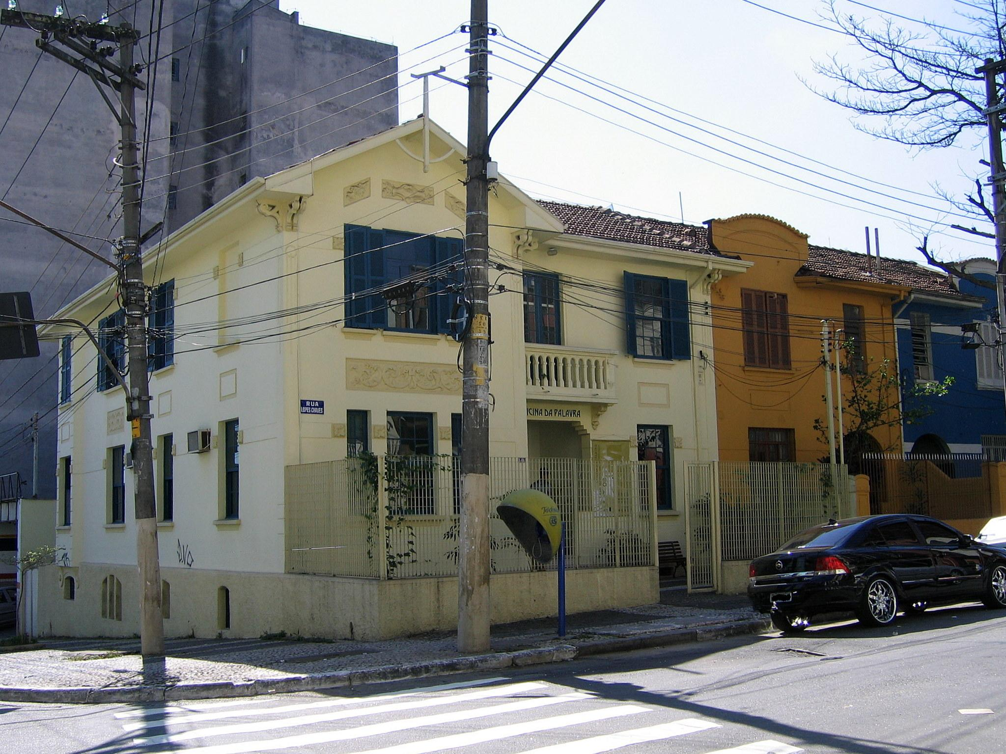 Residência localizada no bairro da Barra Funda, no município de São Paulo, onde residiu o escritor brasileiro Mário de Andrade.